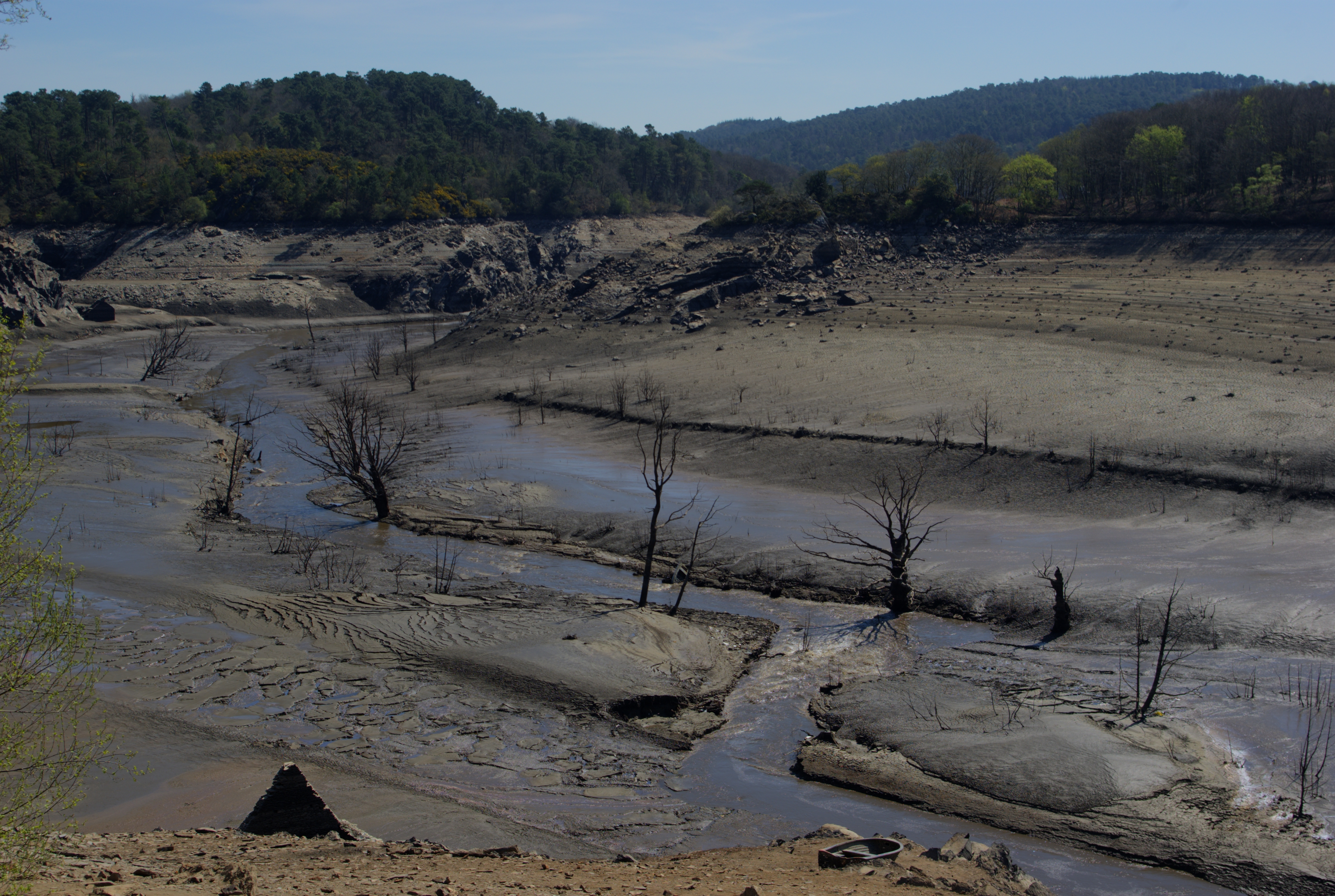 Lac de Guerlédan lors de la vidange 2015